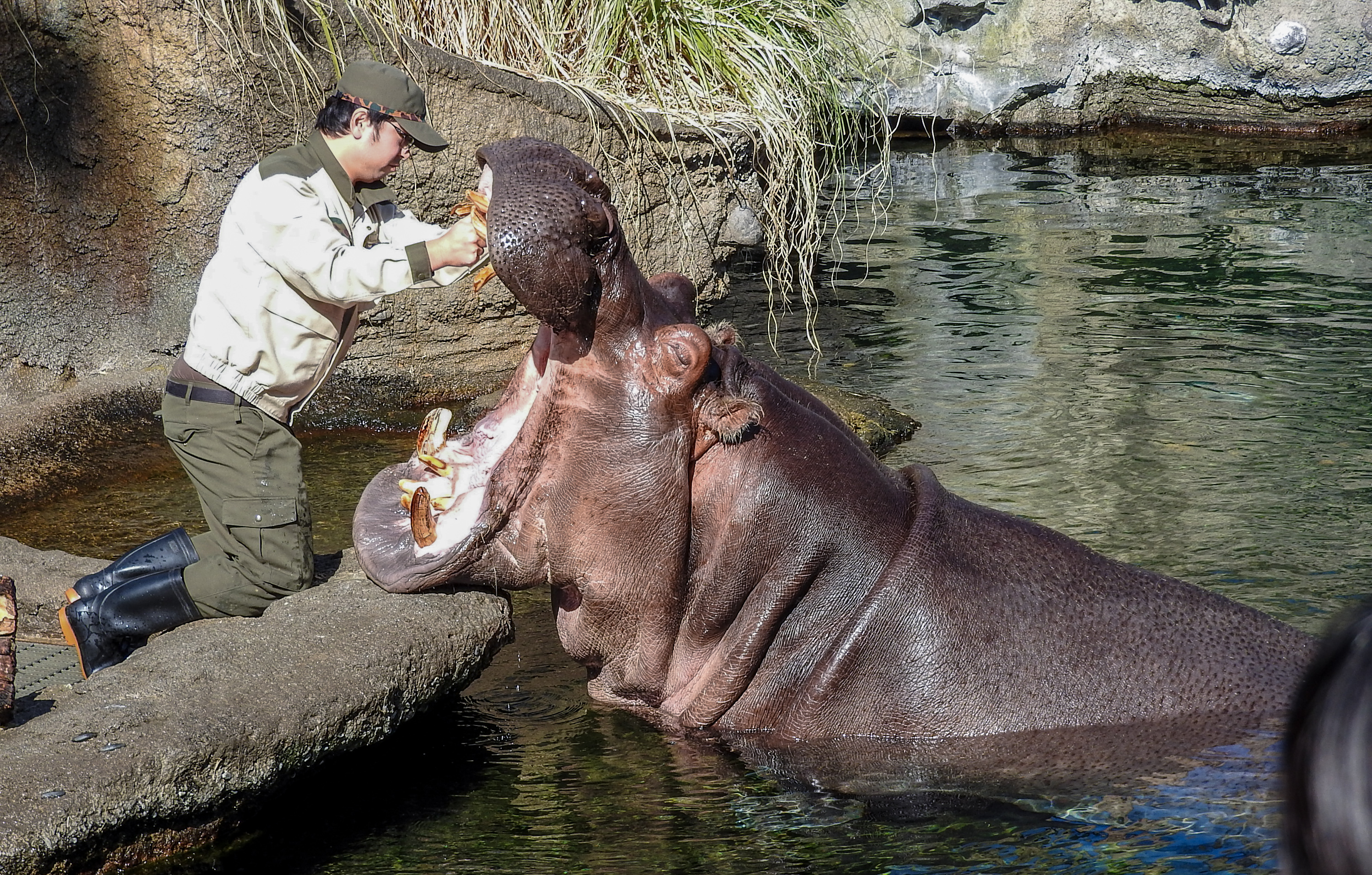 飼育員?